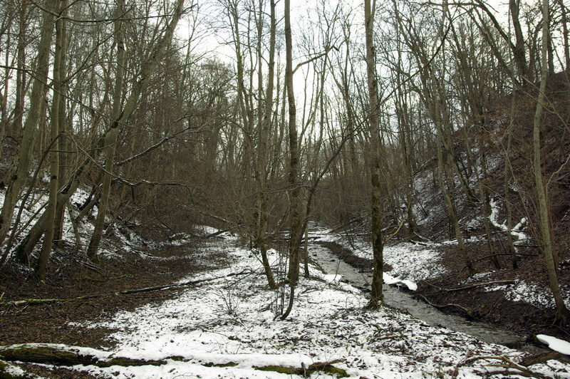 Orasoja kanjon.